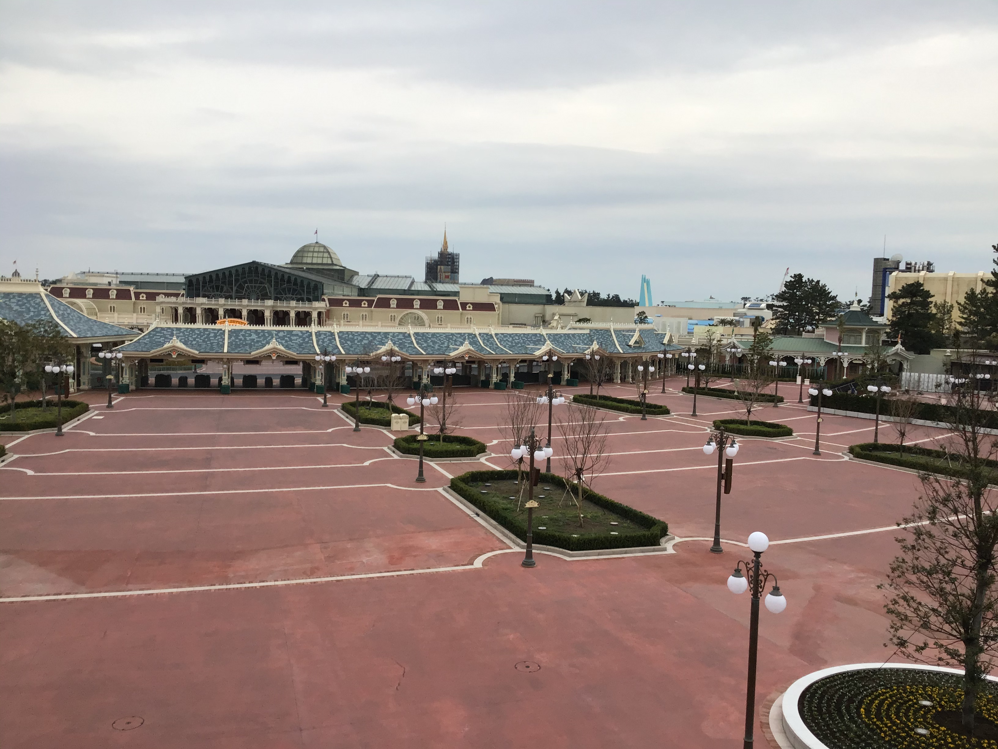 新型コロナウィルス感染症の流行を受けて閉園となっている東京ディズニーランドの入園口